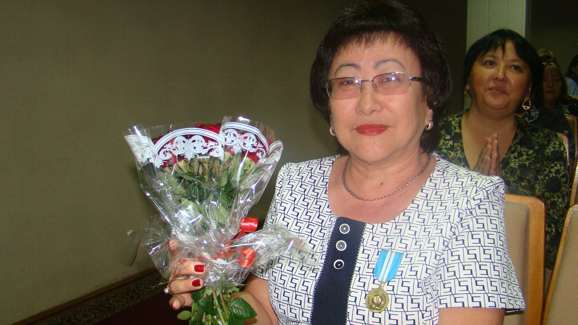 Бексултанова В. К.